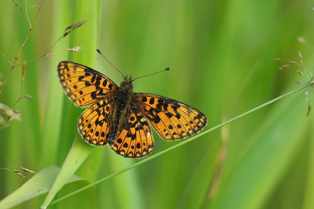 Perleťovec dvanáctitečný (Boloria selene), Plzeňsko, 2014